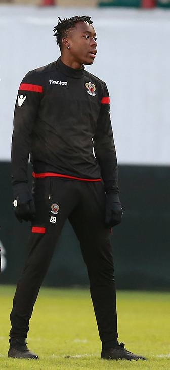 Подопечные Семина и Фавра готовятся к бою